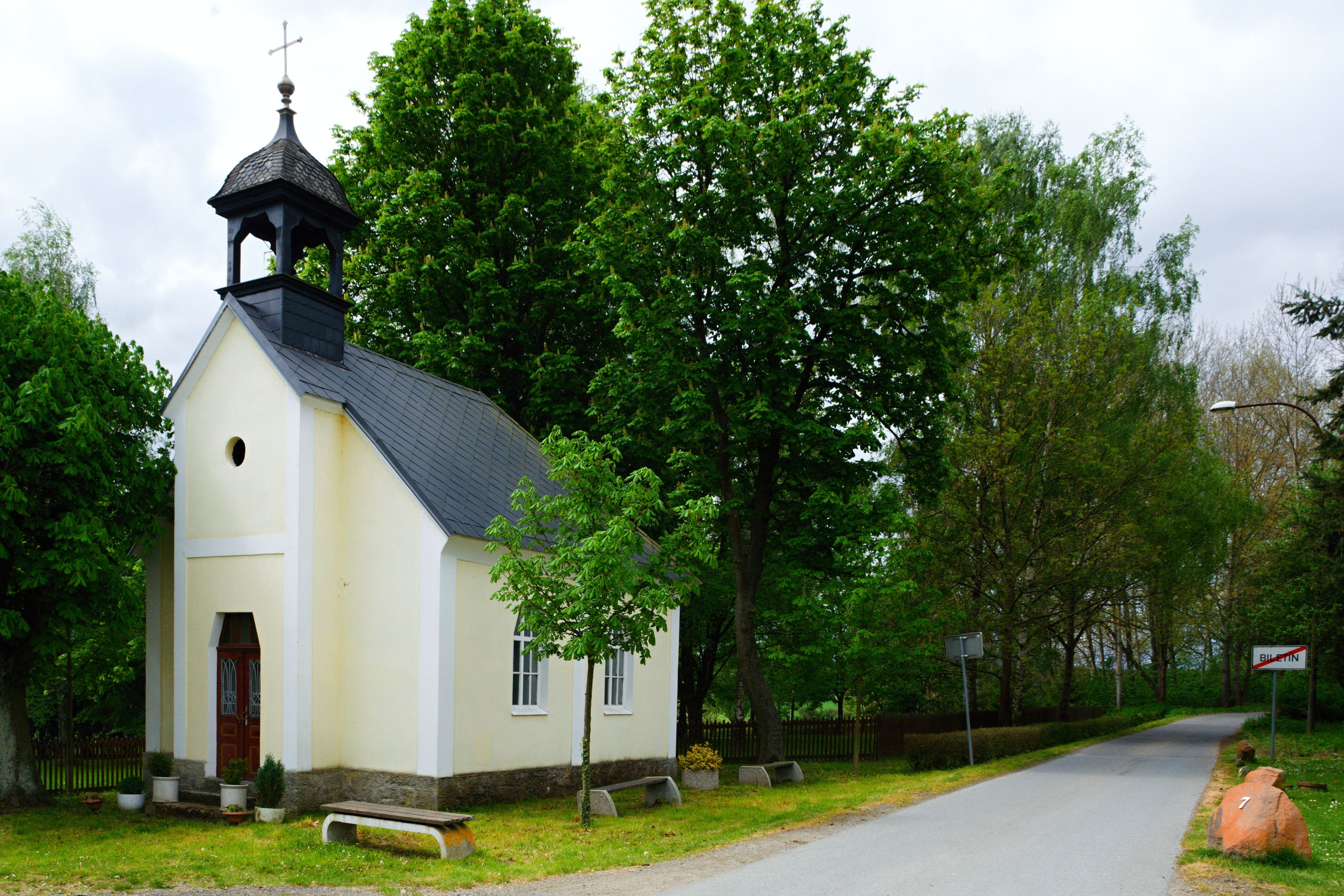 Biletín kaplička